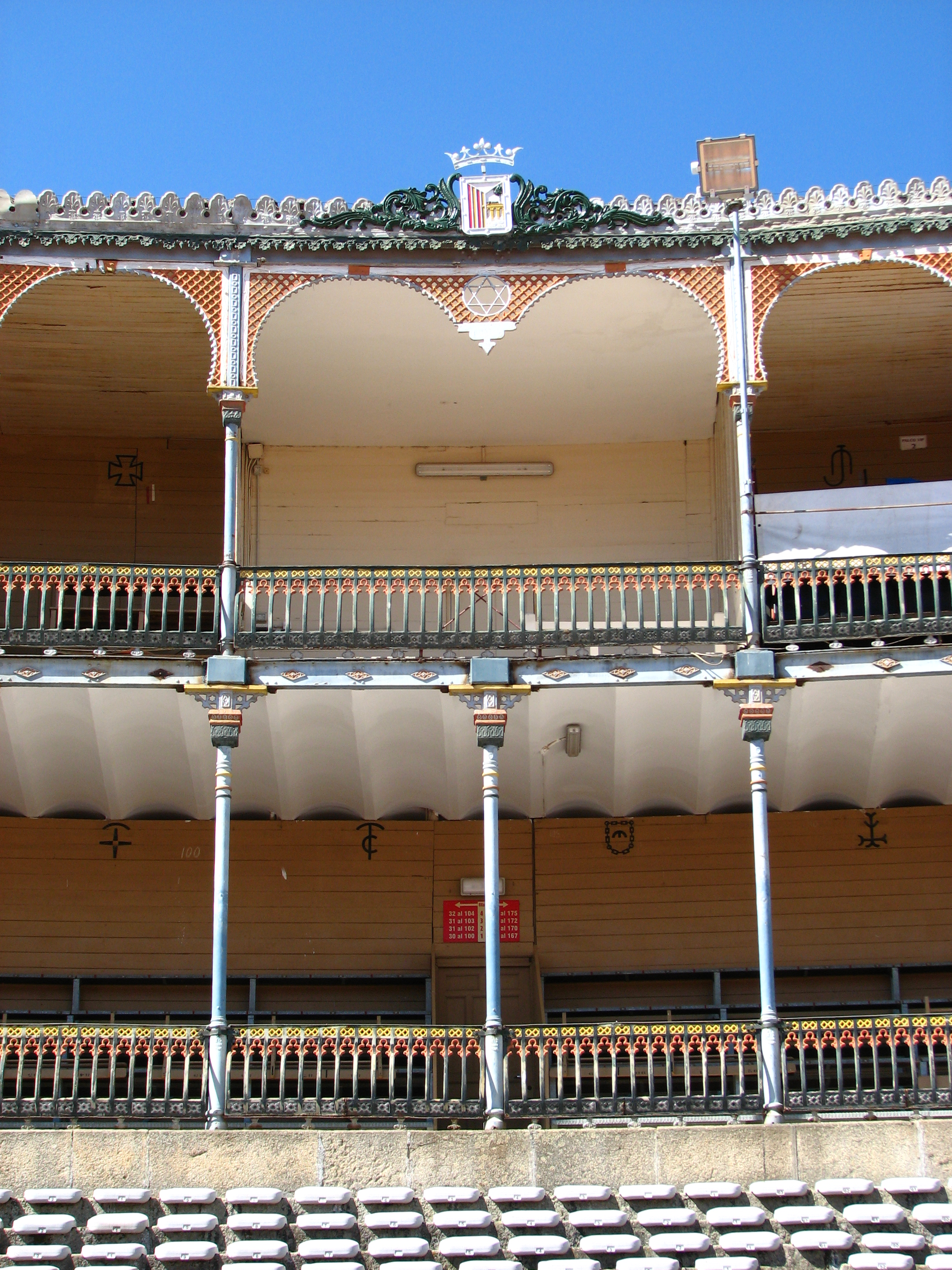 Palco presidencial. La plaza de toros de Salamanca es de 2º categoría, situada entre la carretera de Fuentesaúco y la carretera de Valladolid. Inaugurada en 1893. Tiene un aforo de 11.800 localidades. Celebra la feria taurina del 8 al 21 de septiembre en honor a la Virgen de la Vega